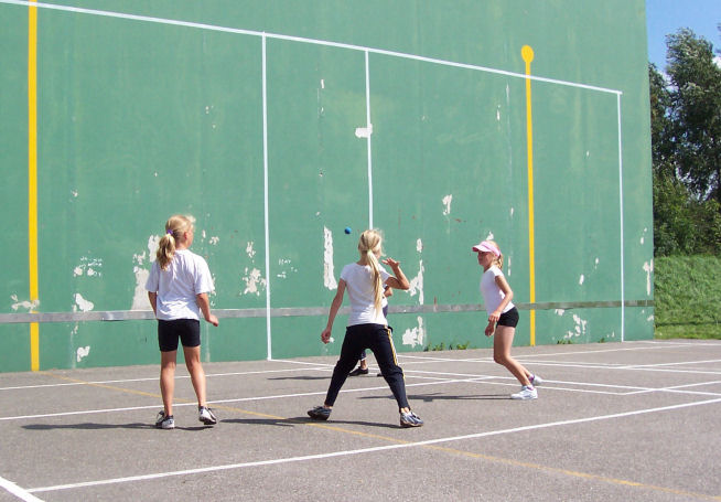 Girls playing Muorrekeatsen